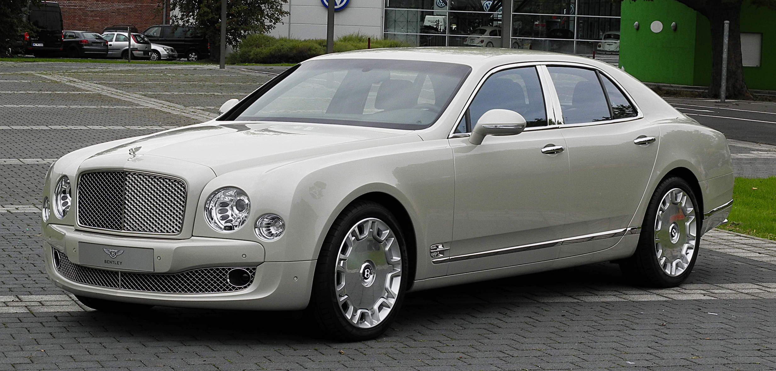 Bentley Mulsanne